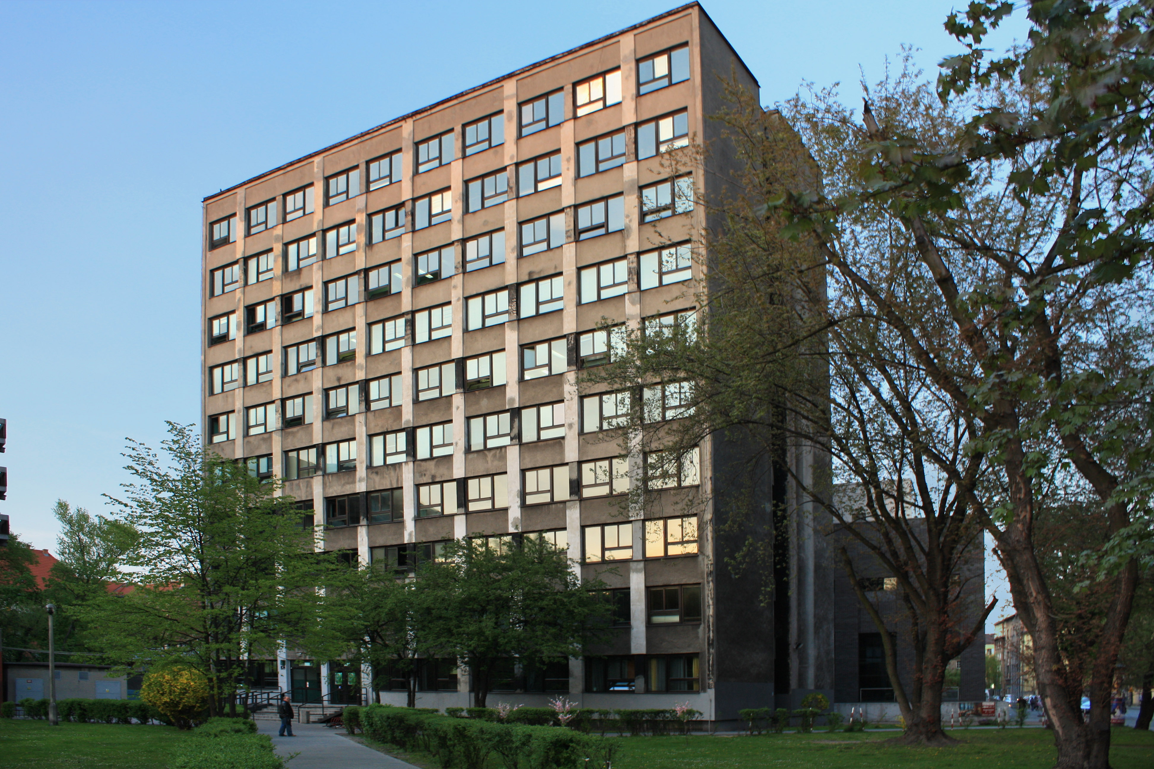 Collegium Paderevianum, Kraków